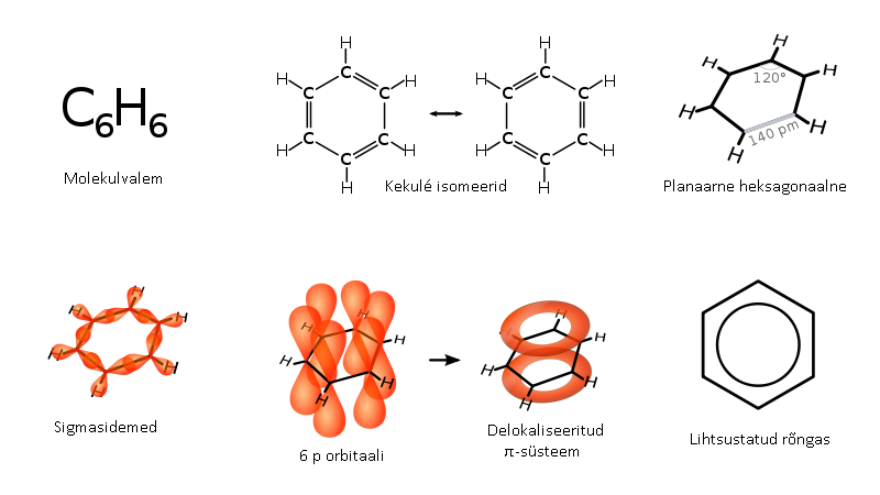 Benseeni erinevad esitamisviisid